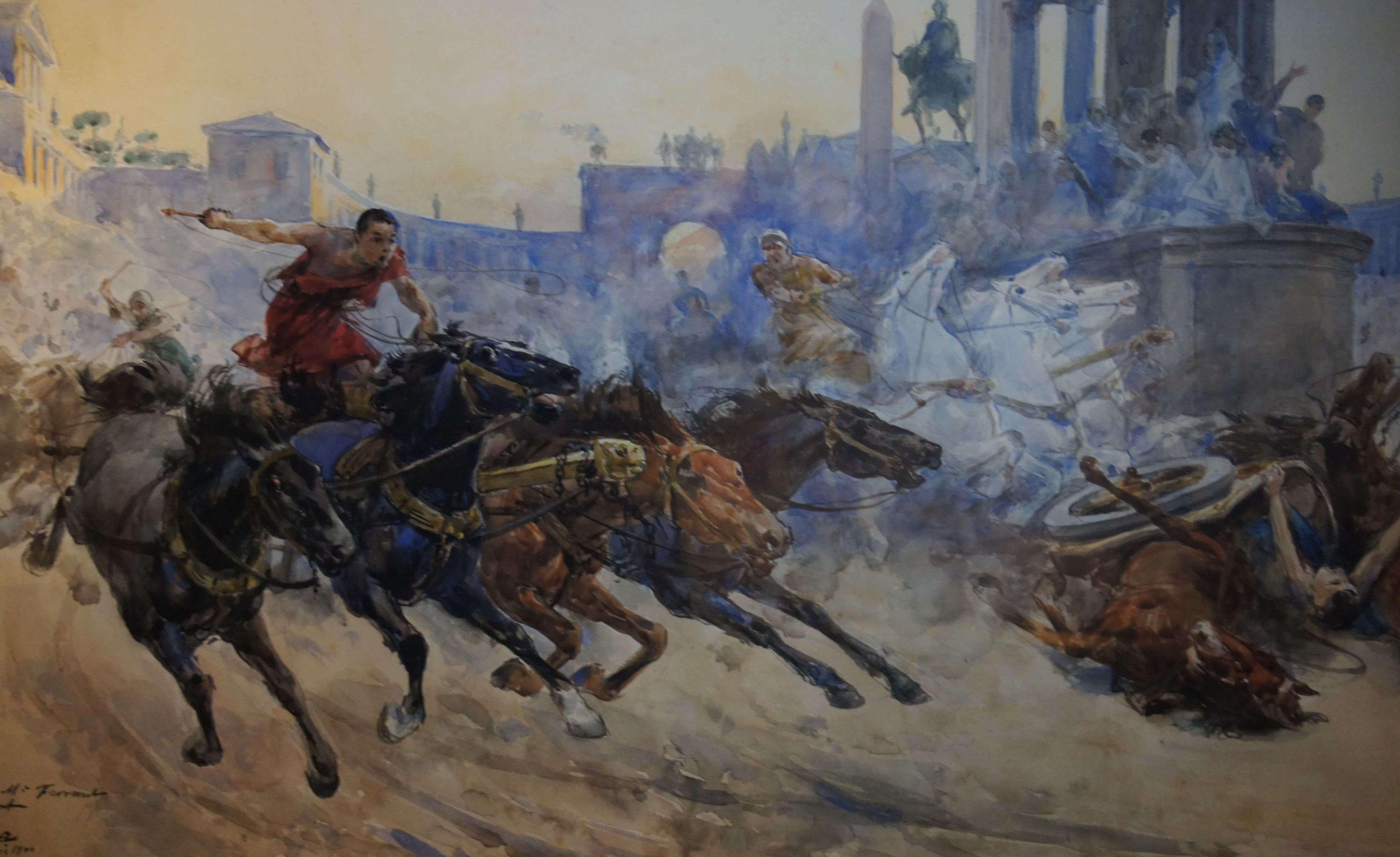 Carrera de carros romanos. Grabado a pintura seca. 1890.